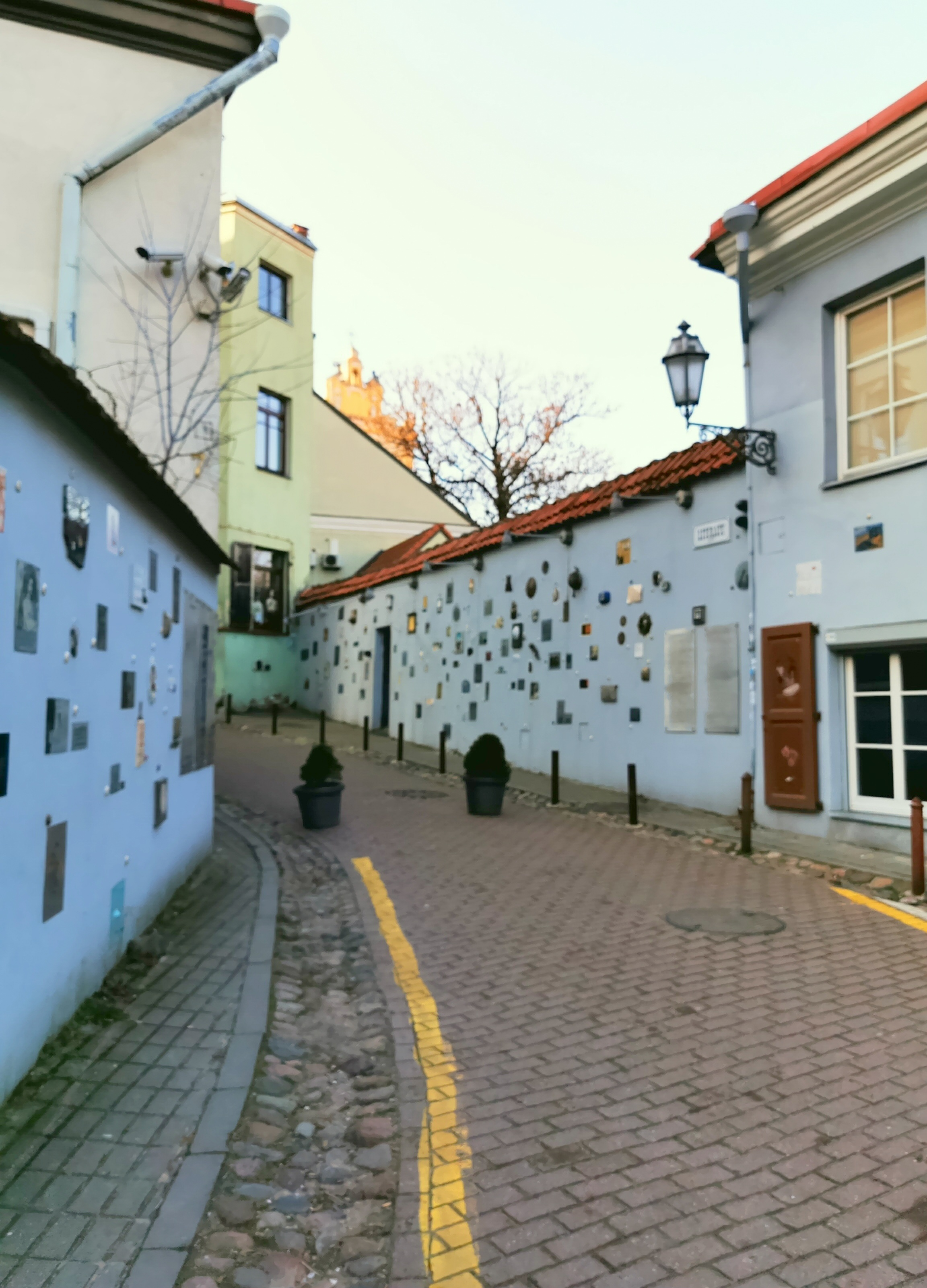 Literatų gatvė Vilniuje